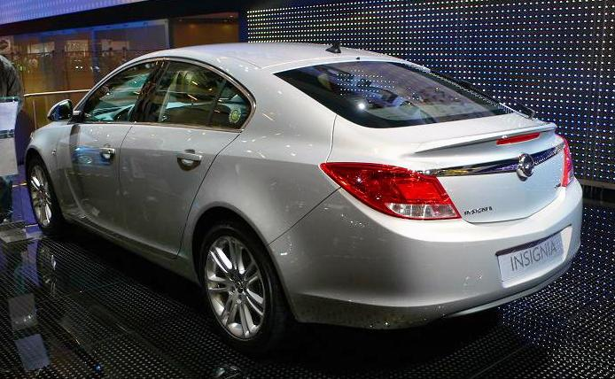 Opel Insignia